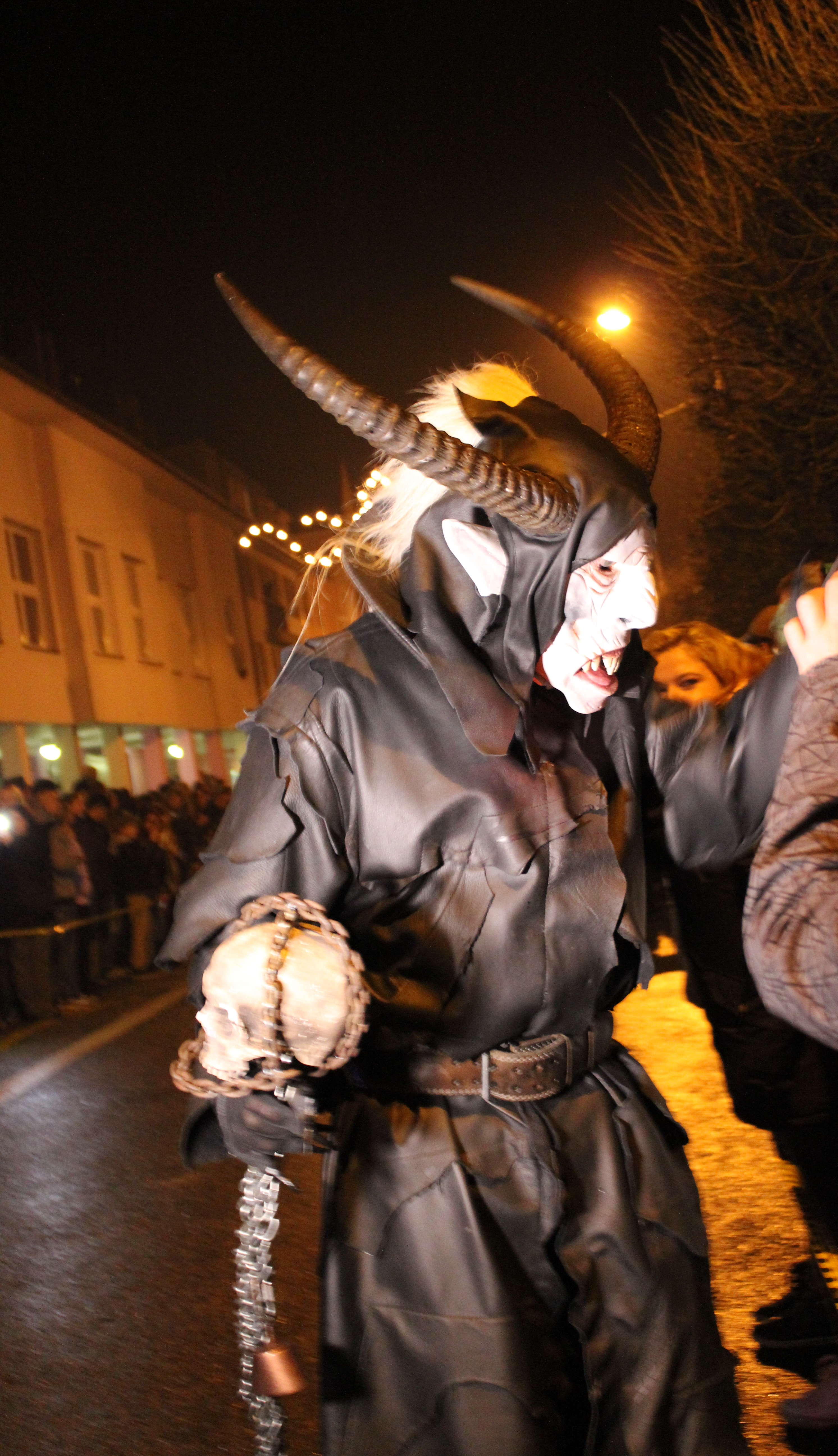 Krampus show. Masarykova ulice. Hluboká nad Vltavou v okrese České Budějovice v Jihočeském kraji. Česká republika. Personality rights warning Although this work is freely licensed or in the public domain, the person(s) shown may have rights that legally restrict certain re-uses unless those depicted consent to such uses. In these cases, a model release or other evidence of consent could protect you from infringement claims.